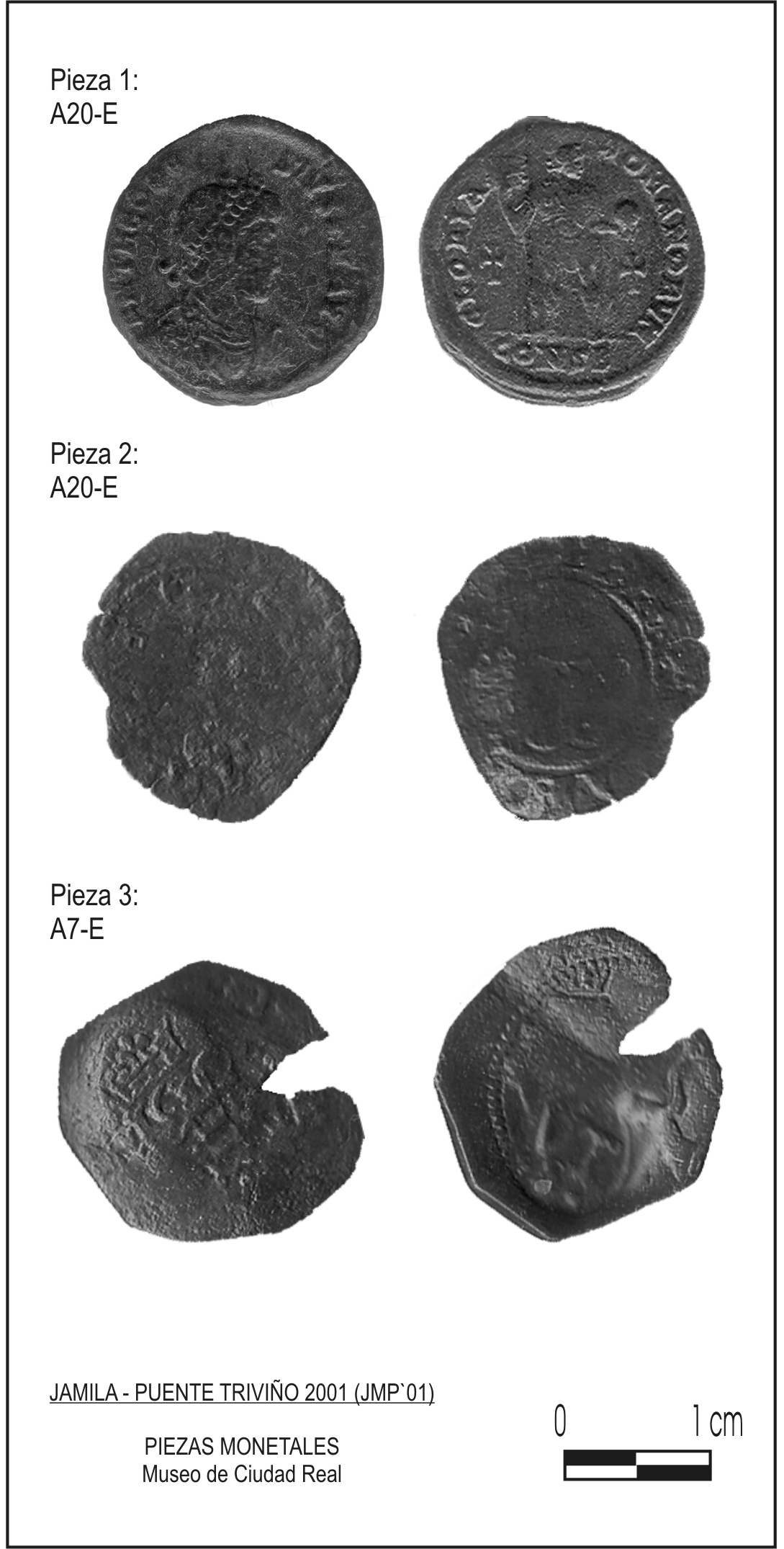 Piezas monetales encontradas en el puente durante la campaña del 2001, se encuentran en el museo de Ciudad Real.